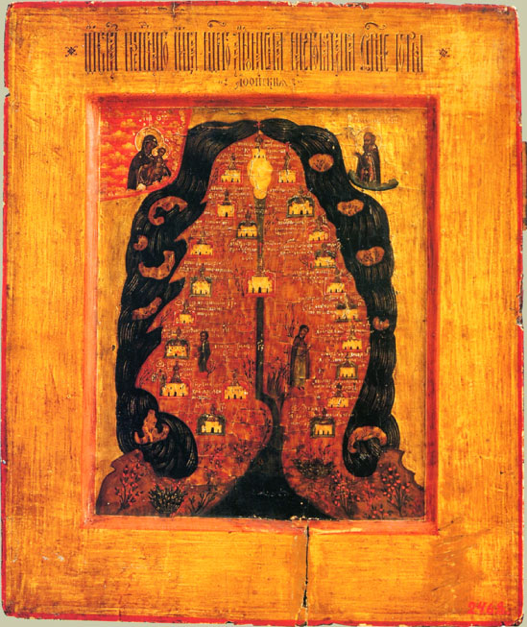 Icone russe représentant les monastères du Mont Athos